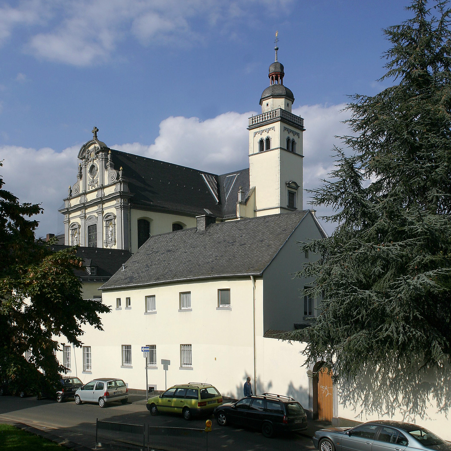 St. Maria vom Frieden, Kirche in Köln, Ansicht von Südosten